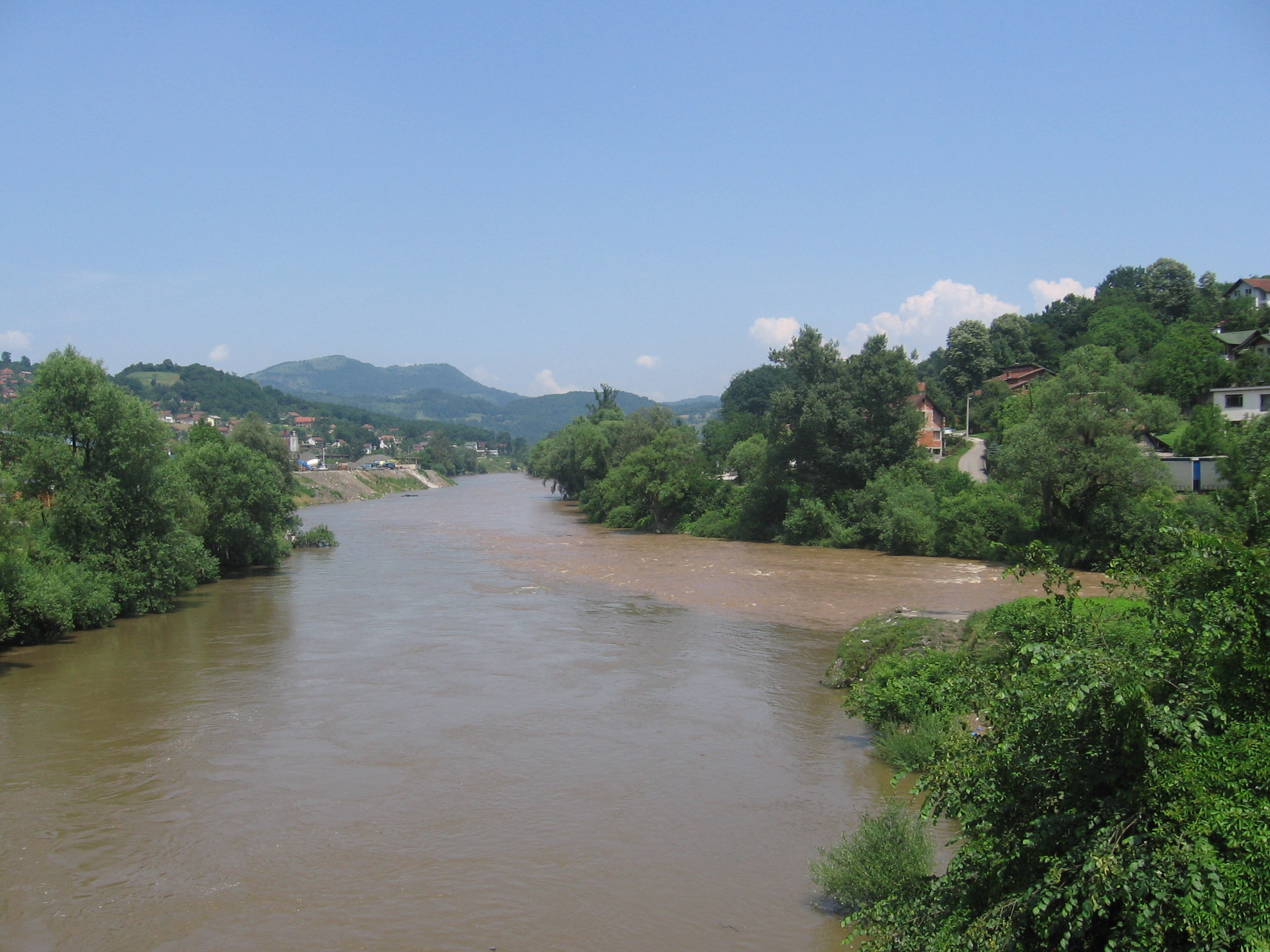 Ušće Krivaje u rijeku Bosnu